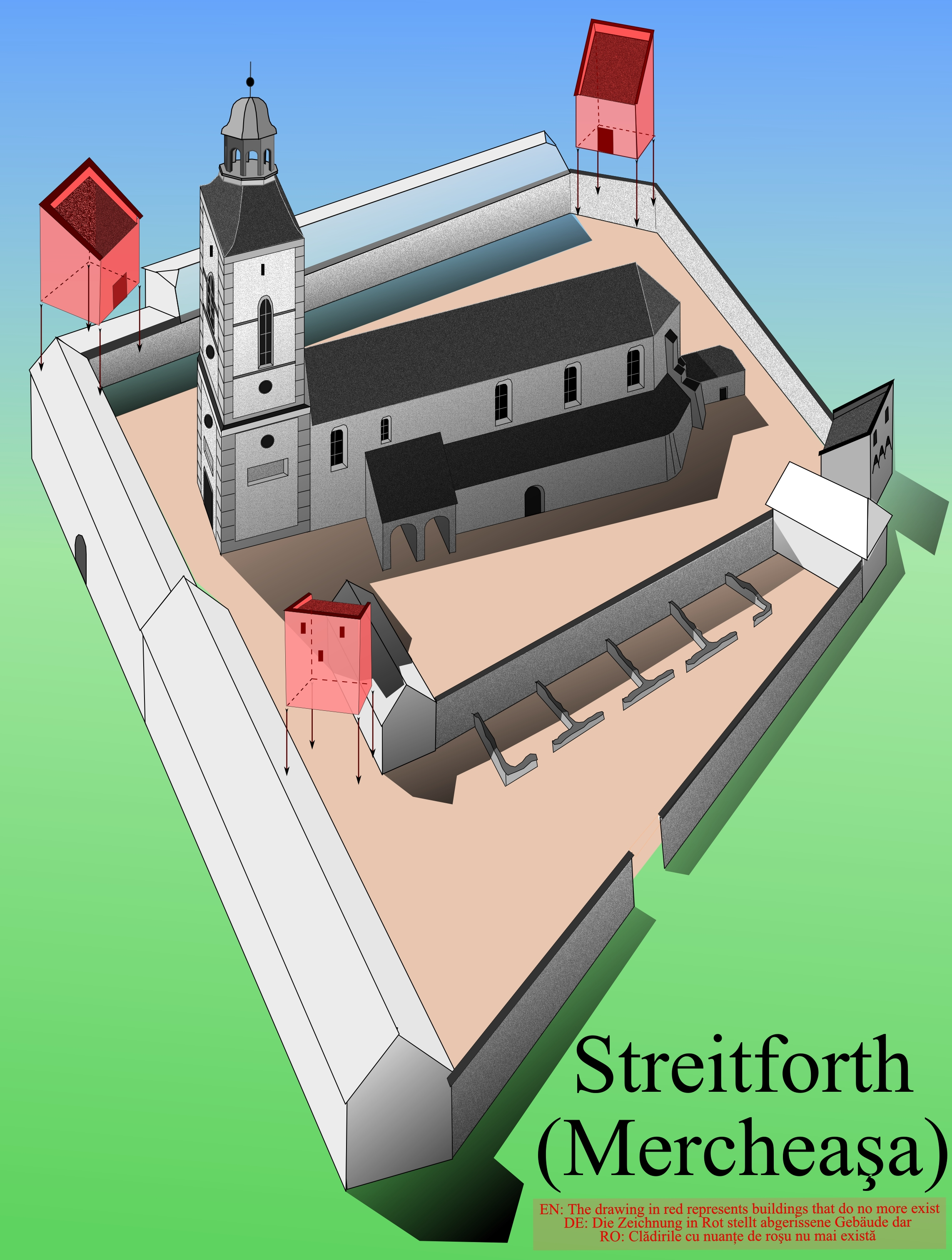 Macheta pentru Biserica fortificata din Mercheasa. La începutul secolului al XVI-lea s-au executat modificări de structură în ce privește fortificația bisericii. S-a ridicat astfel, incinta patrulateră ce avea turnuri cu acoperișuri în pupitru la coțuri. În ziua de astăzi mai există doar bastionul sud estic.